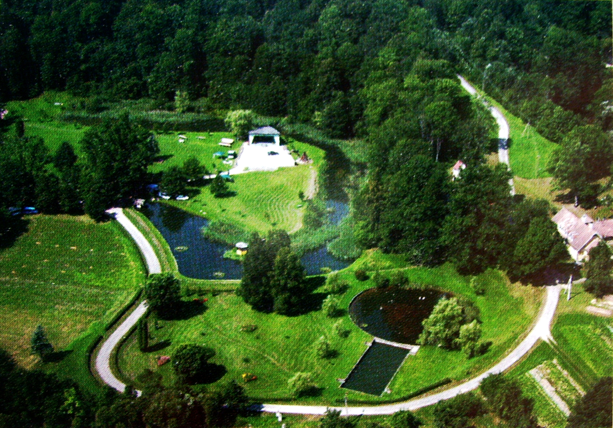 Lakštingalų slėnis, Tauragės raj.